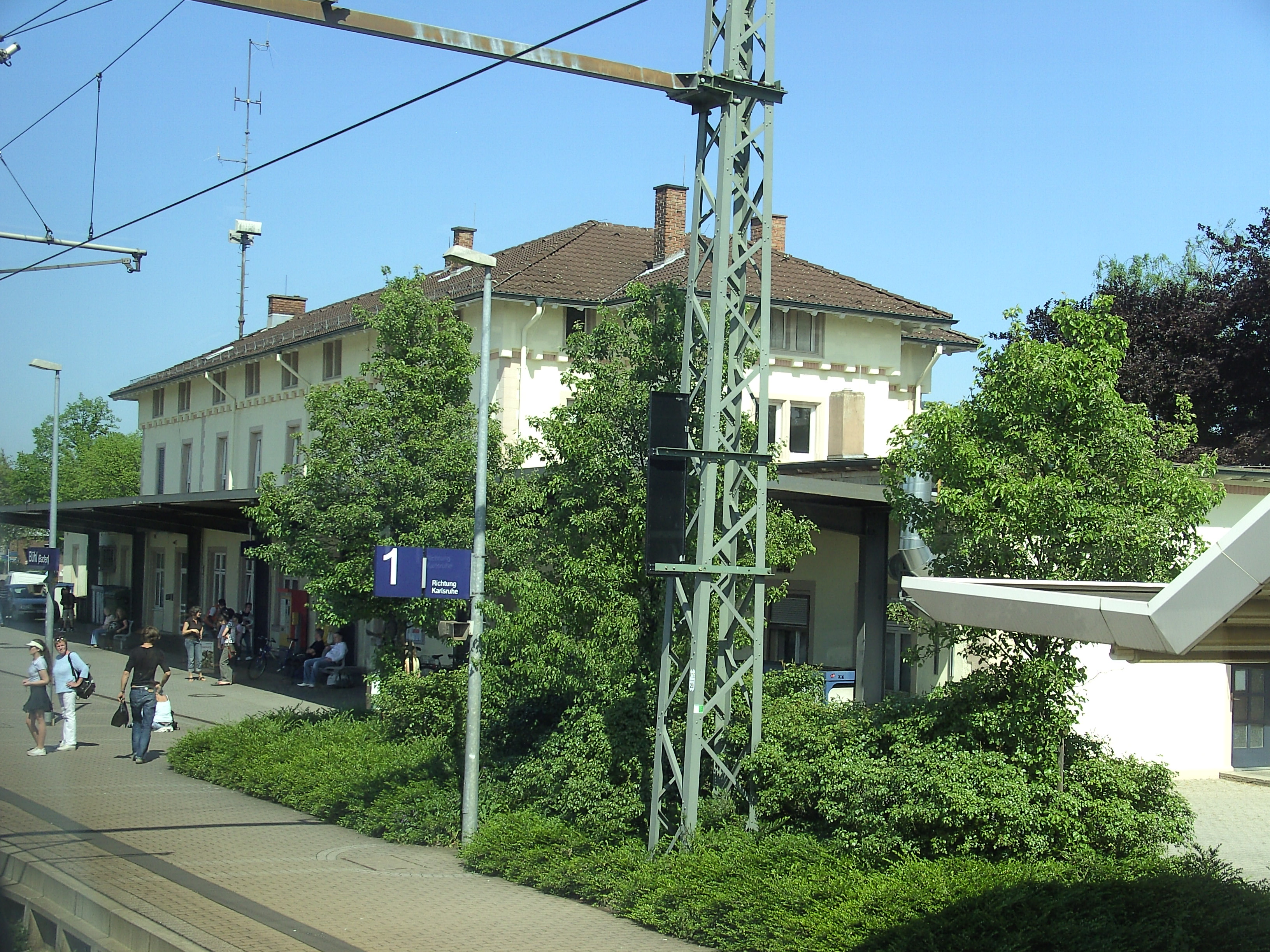 Der Bahnhof von Bühl (Baden)